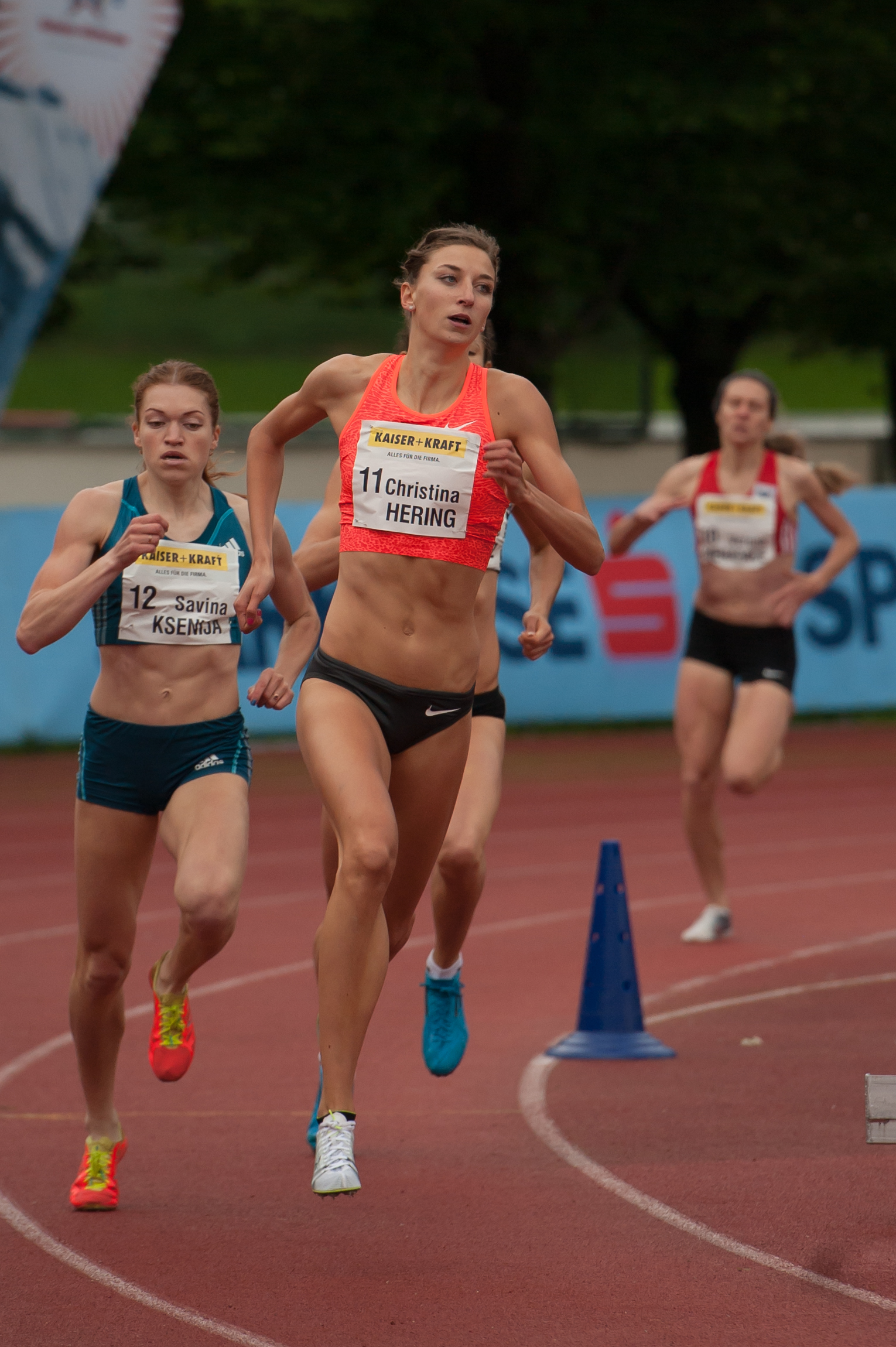 Salzburger Leichtathletik Gala am 27. Mai 2015: Christina Hering